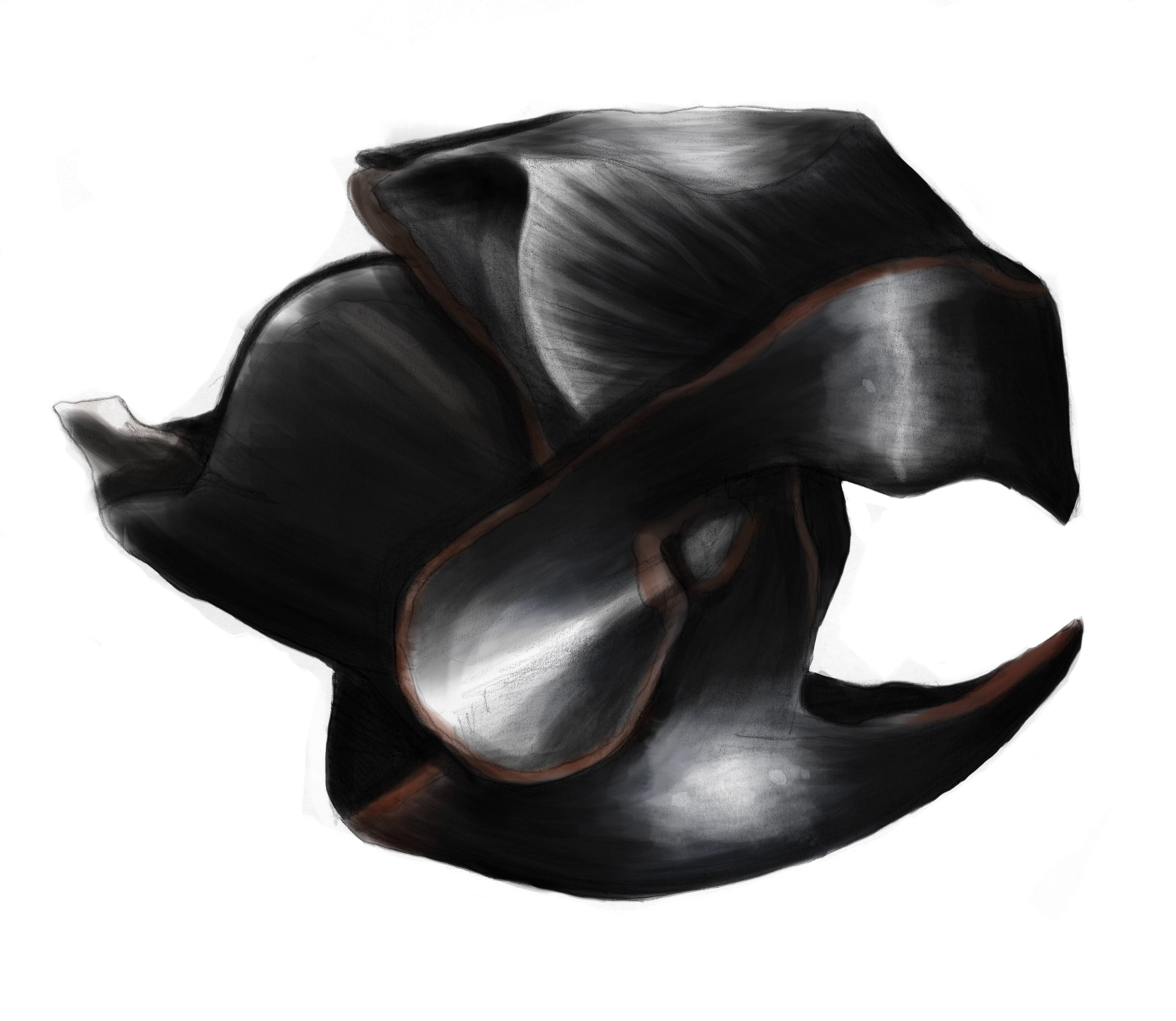 Un bec de calmar colossal Mesonychoteuthis hamiltoni